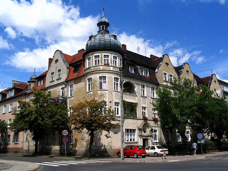 Plac Marcinkowskiego w Gostyniu.